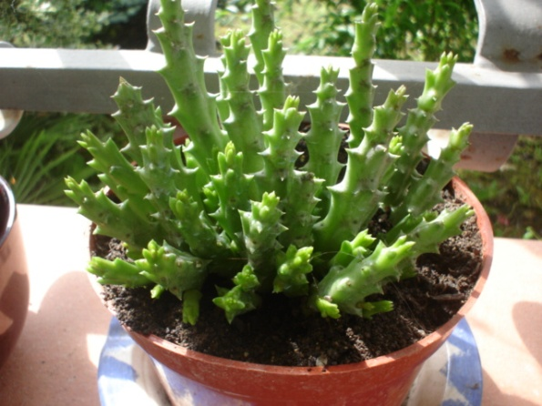 Un esemplare di Stapelia.